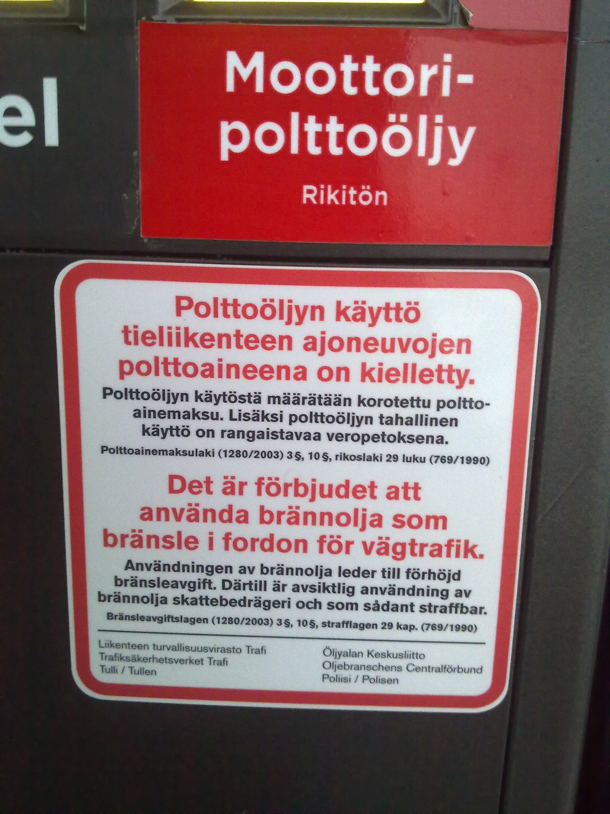 Varoitus ja kielto polttoöljyn käytöstä tieliikenteessä.